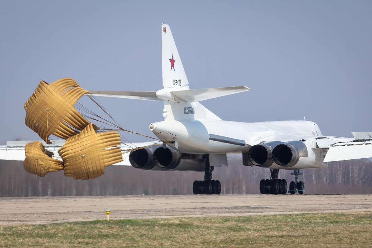 Тяжёлые бомберы Ту-160М 22-й гвардейской тяжёлой бомбардировочной дивизии проходят тренировочные вылеты для участия в параде Победы 9 мая 2019.